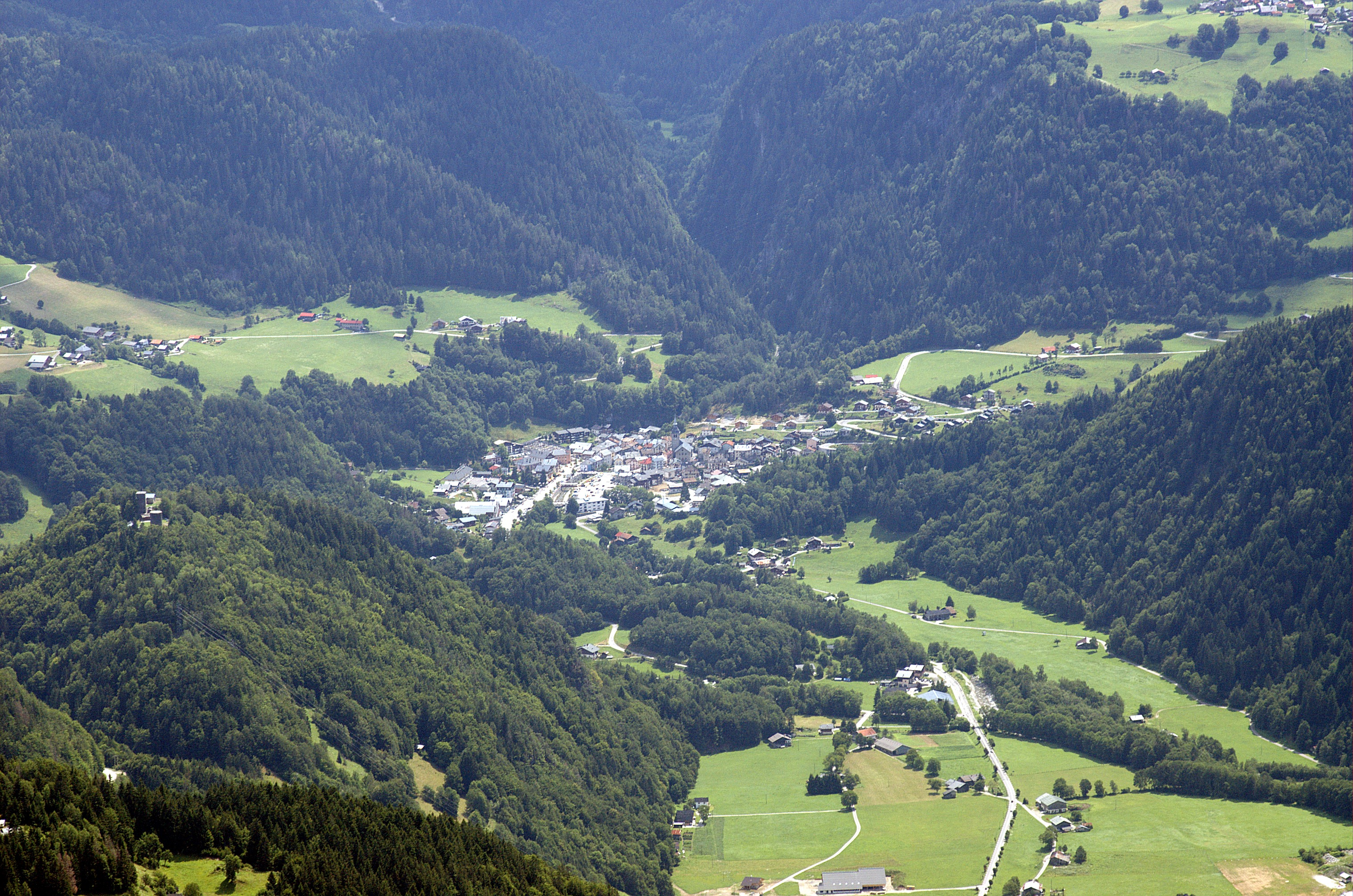 La commune de Beaufort-sur-Doron, en Savoie, vue depuis le sommet de Bisanne.